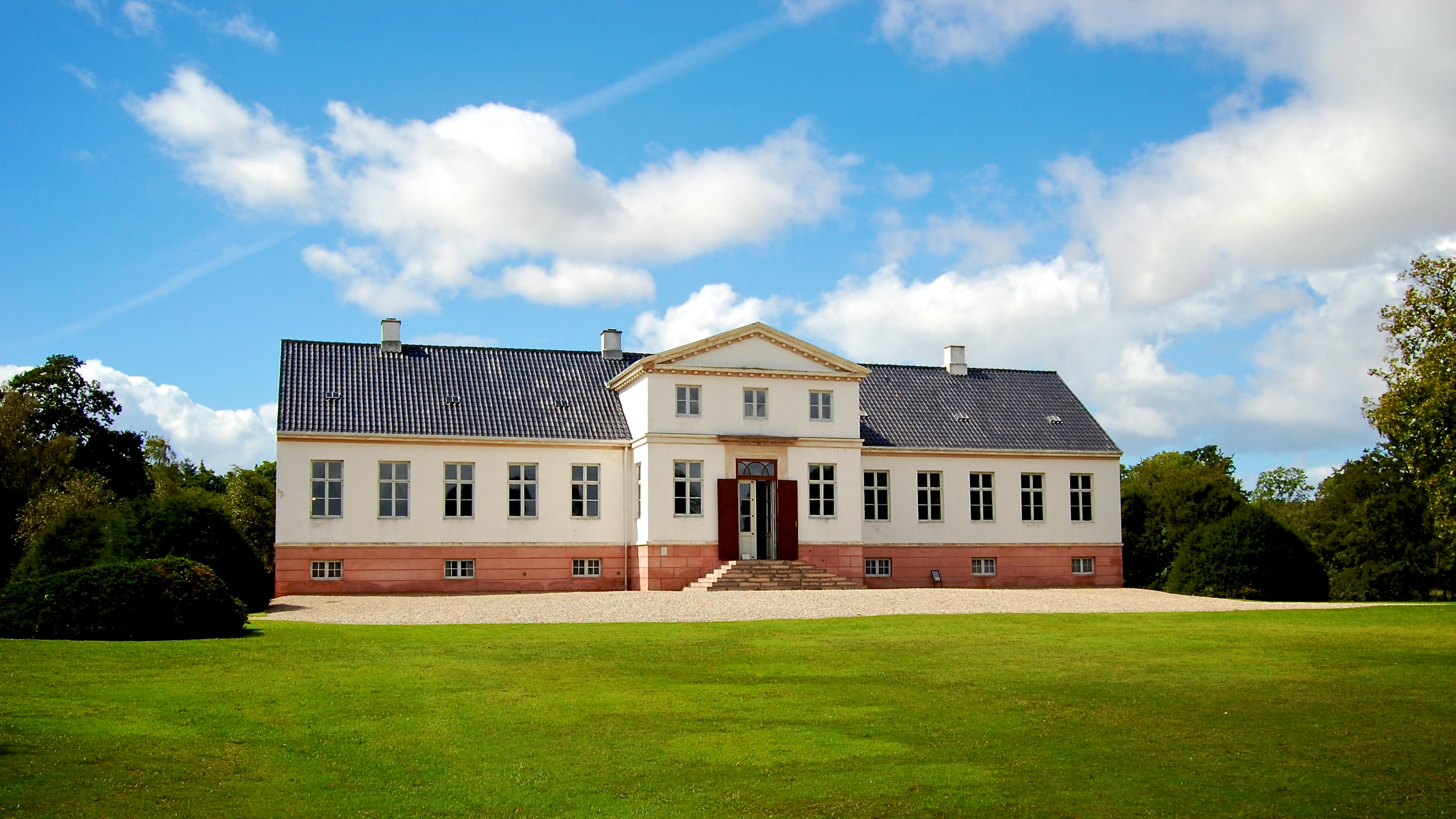 Pederstrup